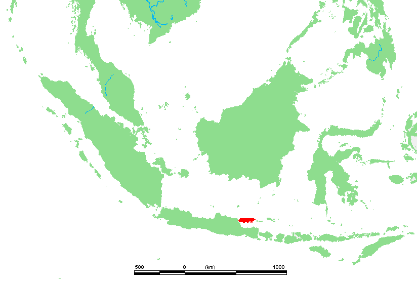 ID Tidore.PNG